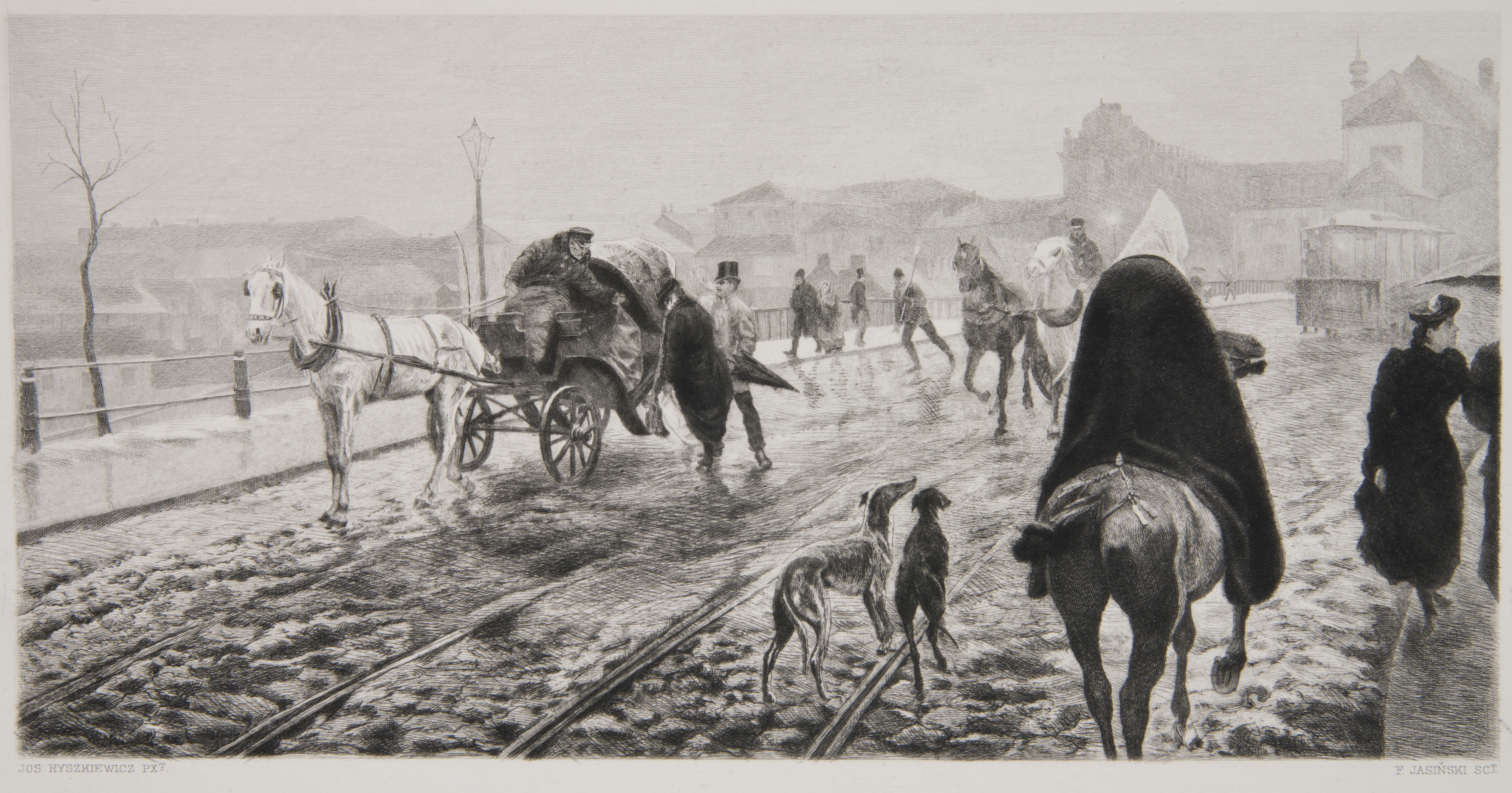 Ulica Nowy Zjazd w Warszawie w słotny dzień - Feliks Jasieński wg. Józef Ryszkiewicz etching